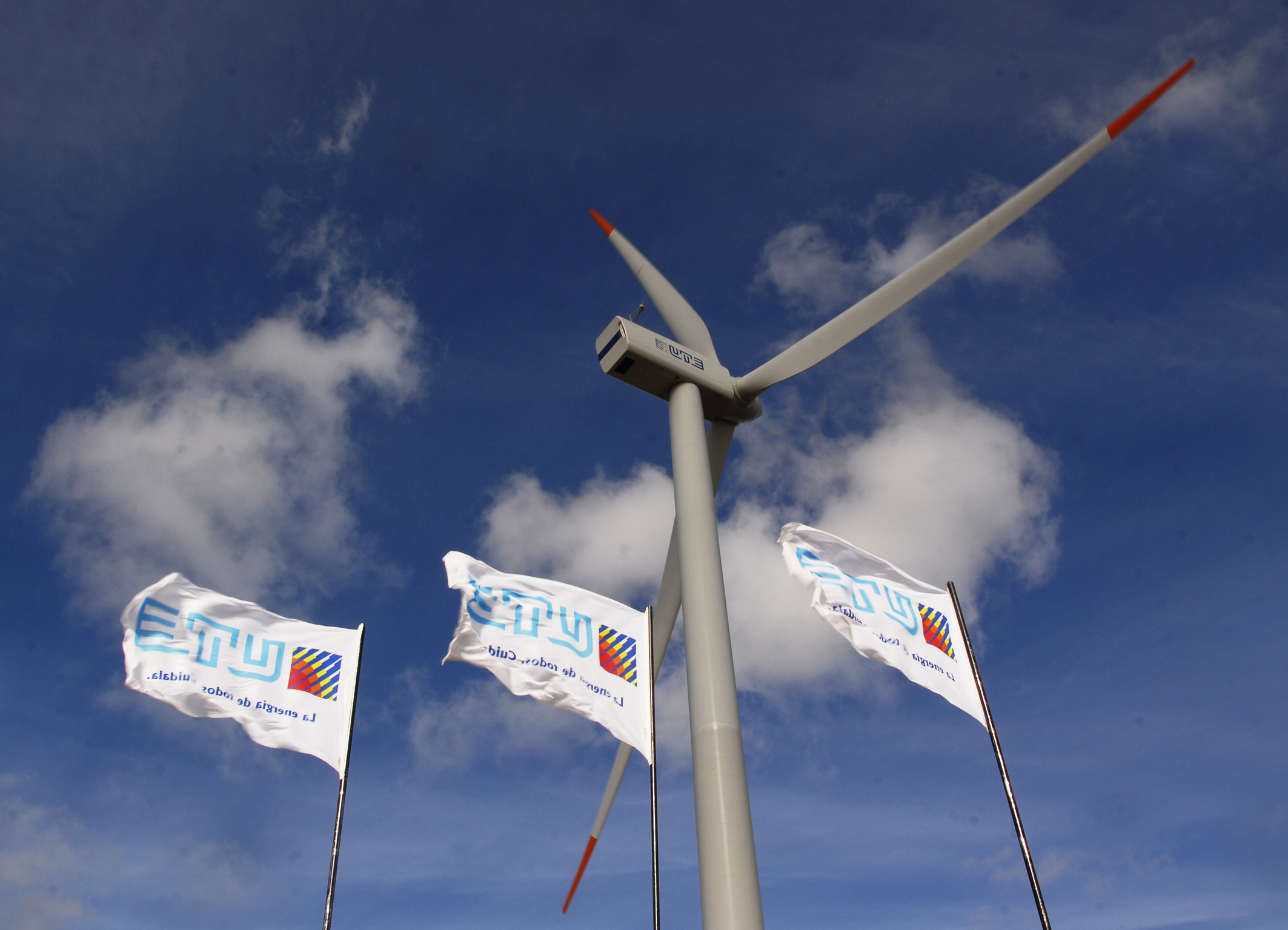 Parque Eólico "Sierra de los Caracoles"